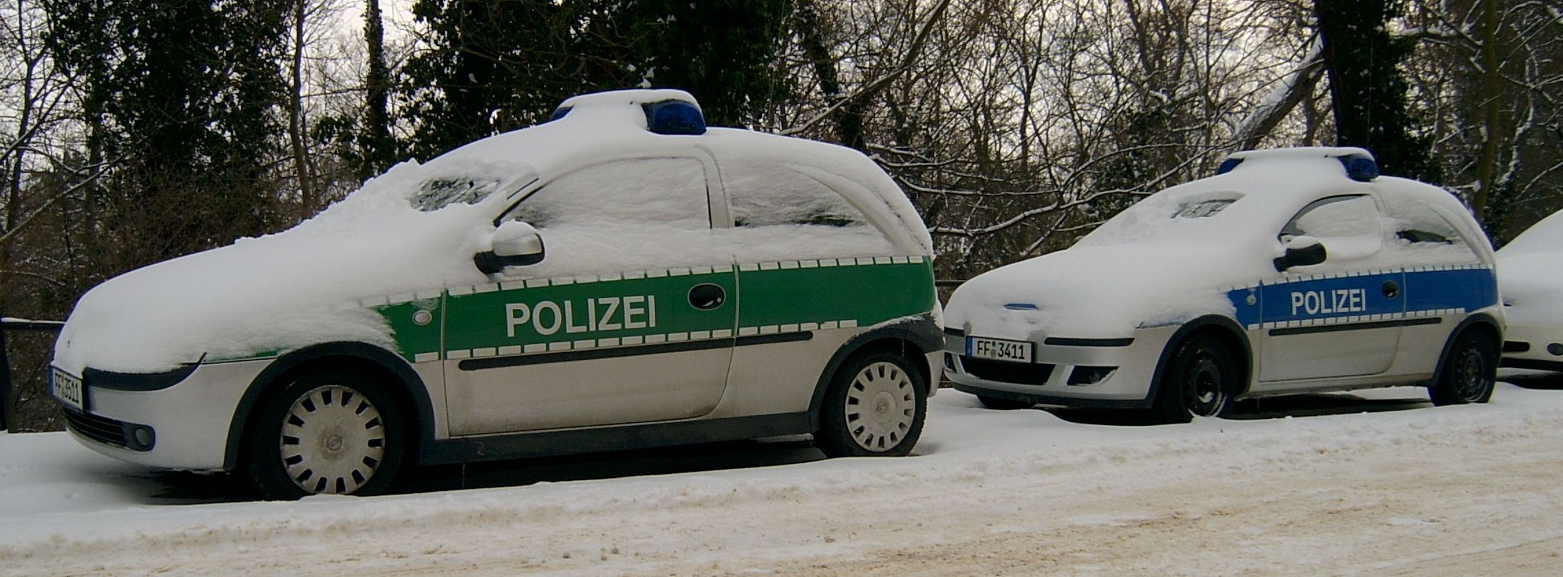 Zwei Einsatzfahrzeuge der Polizei in Frankfurt (Oder). Das linke in grün/weiß, das rechte bereits im neuen blau/weiß. Standort; Vor dem Polizeirevier gegenüber dem Lennépark.